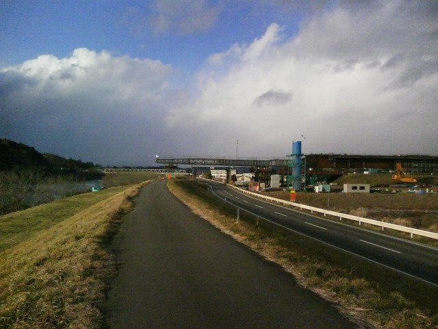 東和町米谷